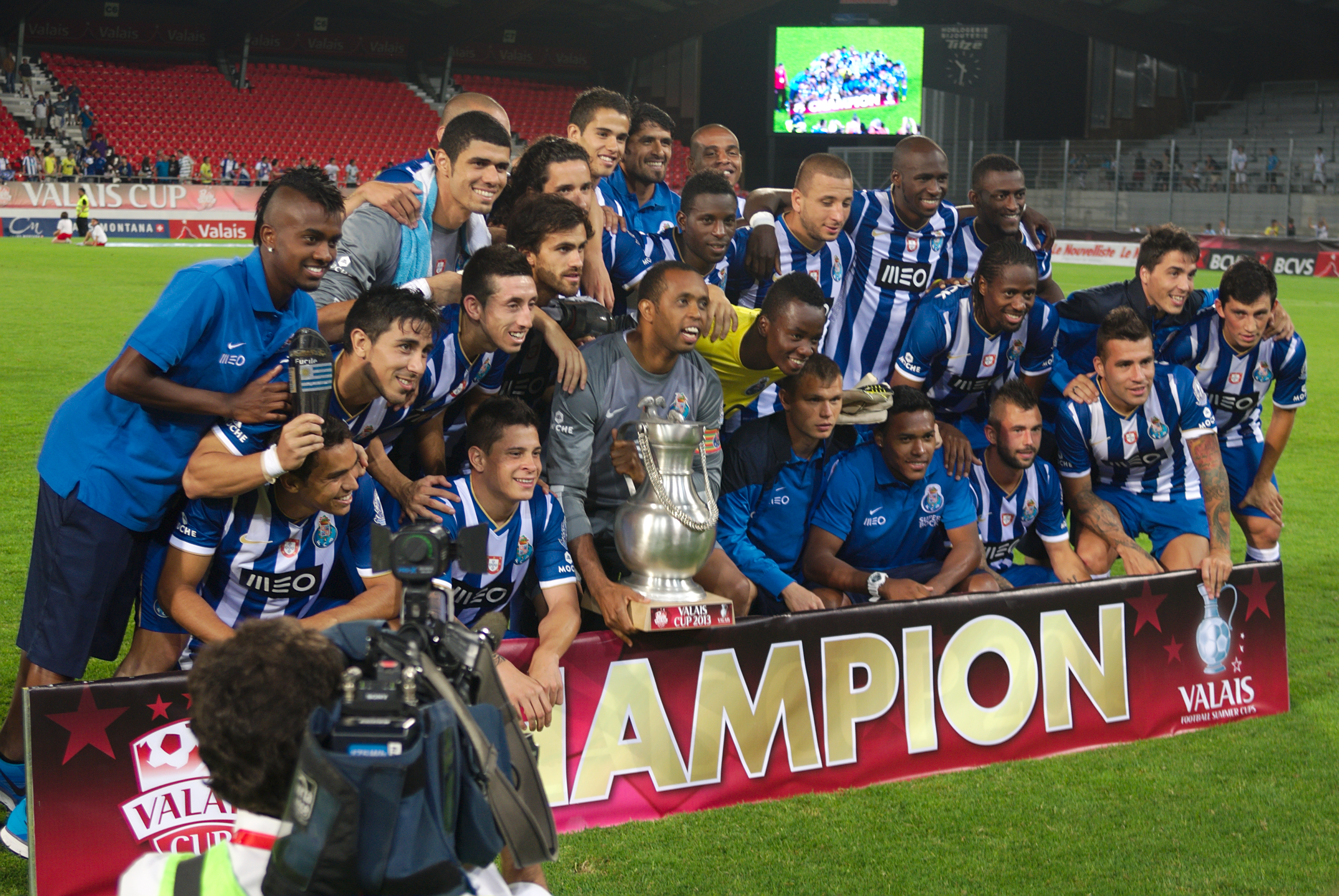 Valais Cup 2013 - OM-FC Porto - 20130713 - FC Porto avec la coupe